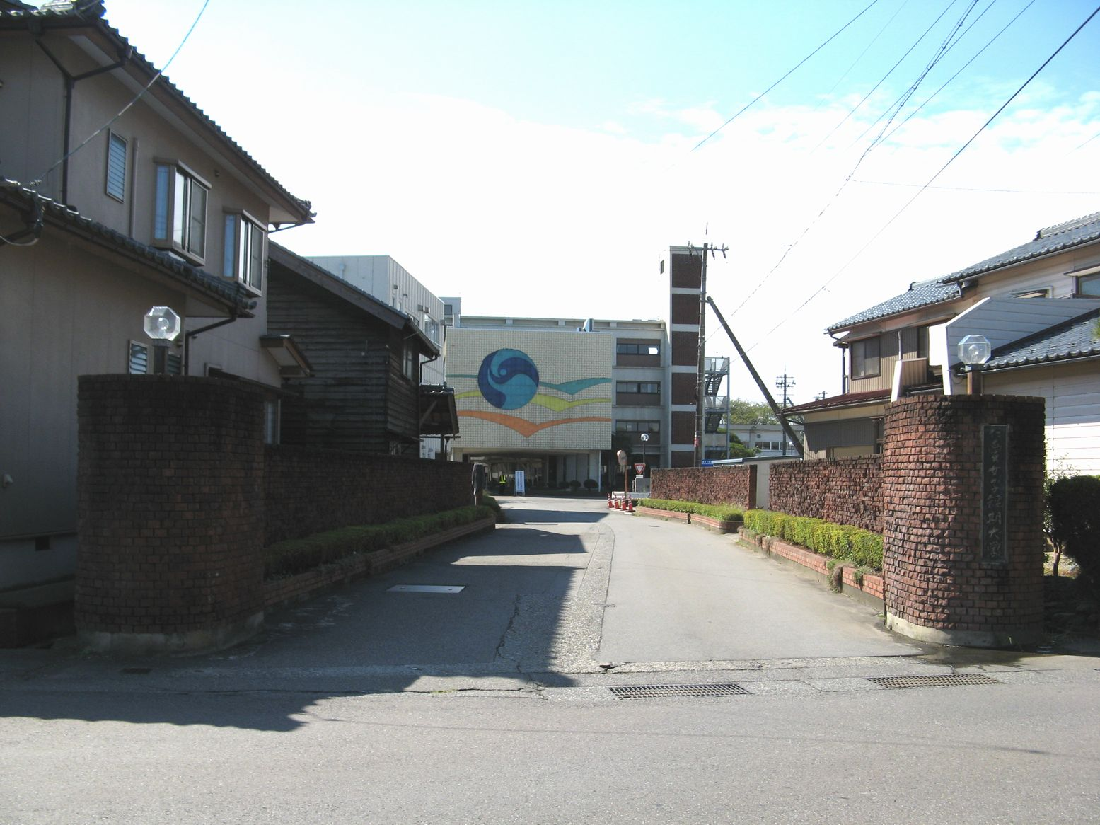 仁愛女子短期大学